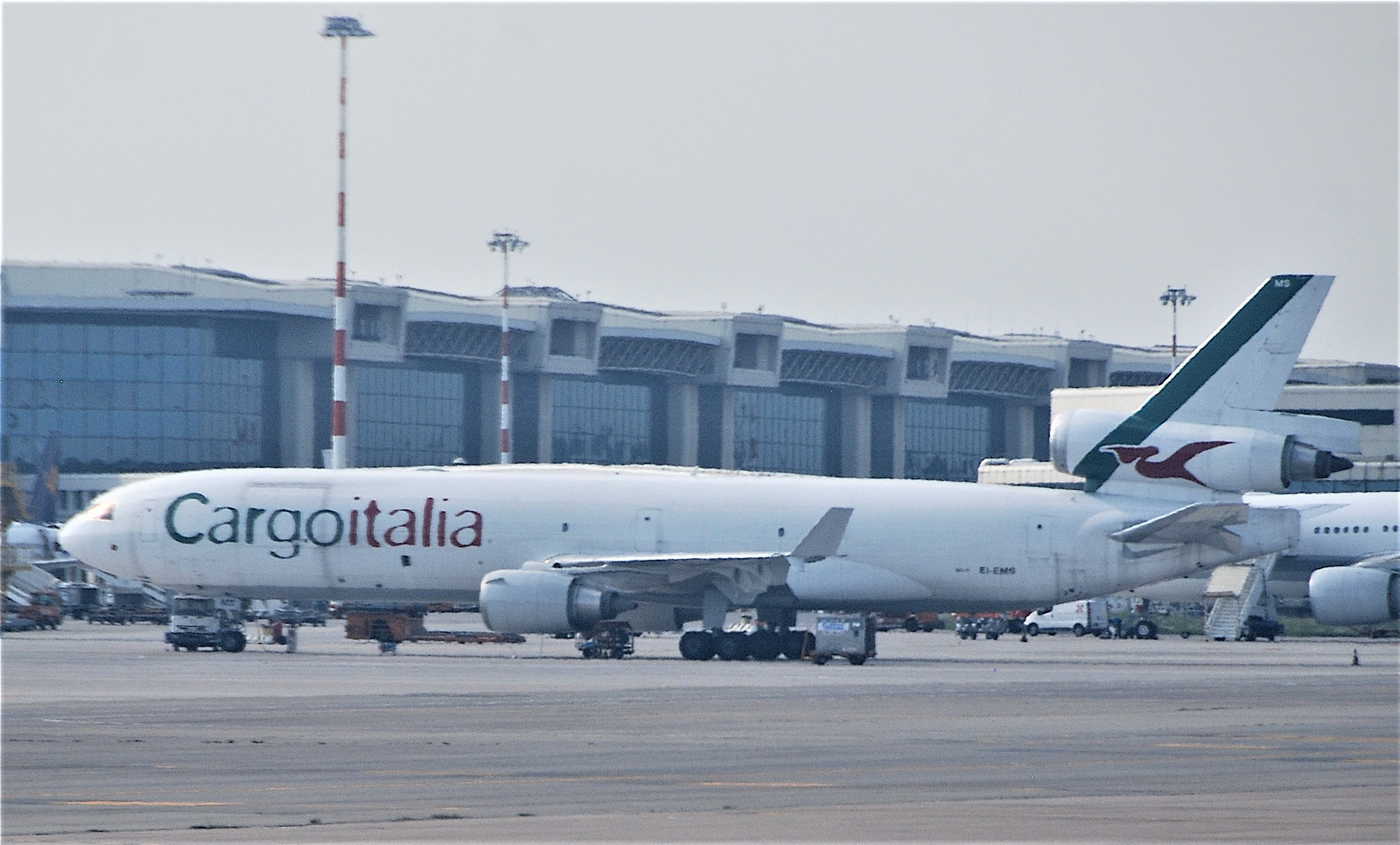 Cargoitalia MD-11F, EI-EMS@MXP;09.07.2011/604bt